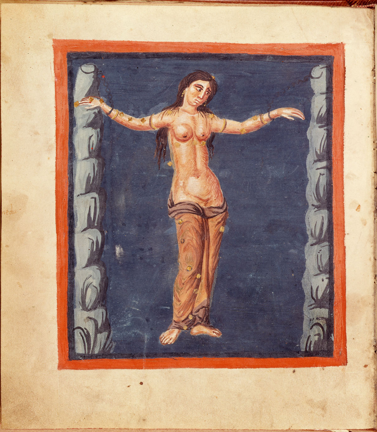 Fol. 30v Andromeda